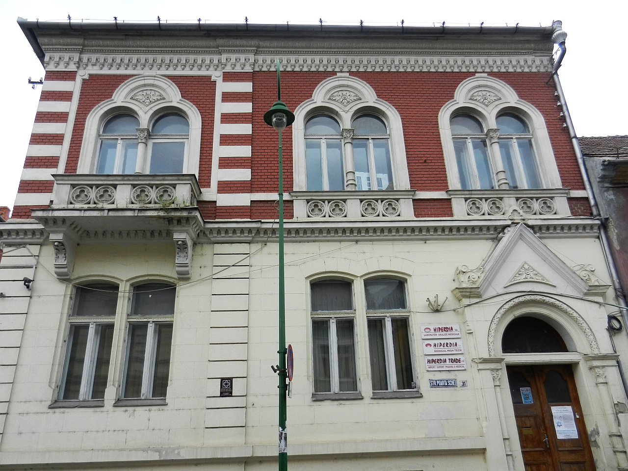 Casă, azi birouri